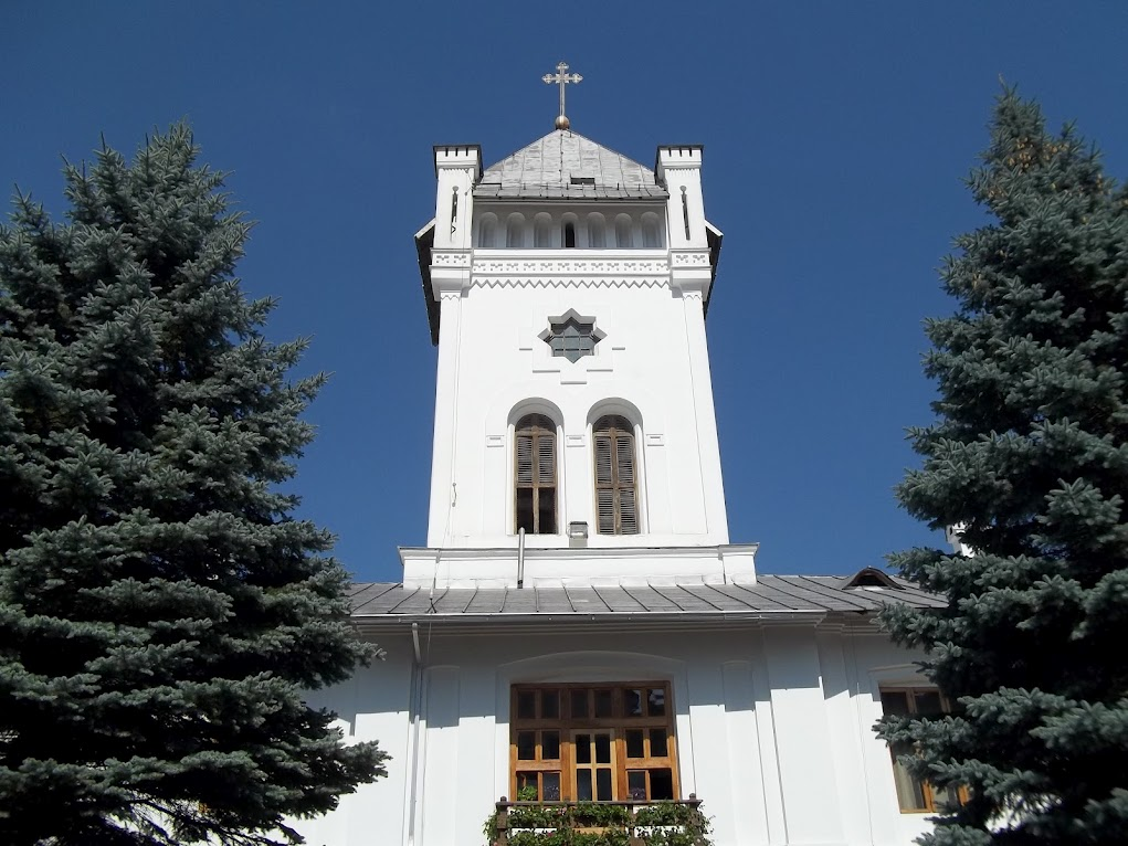 Turn clopotniță 03